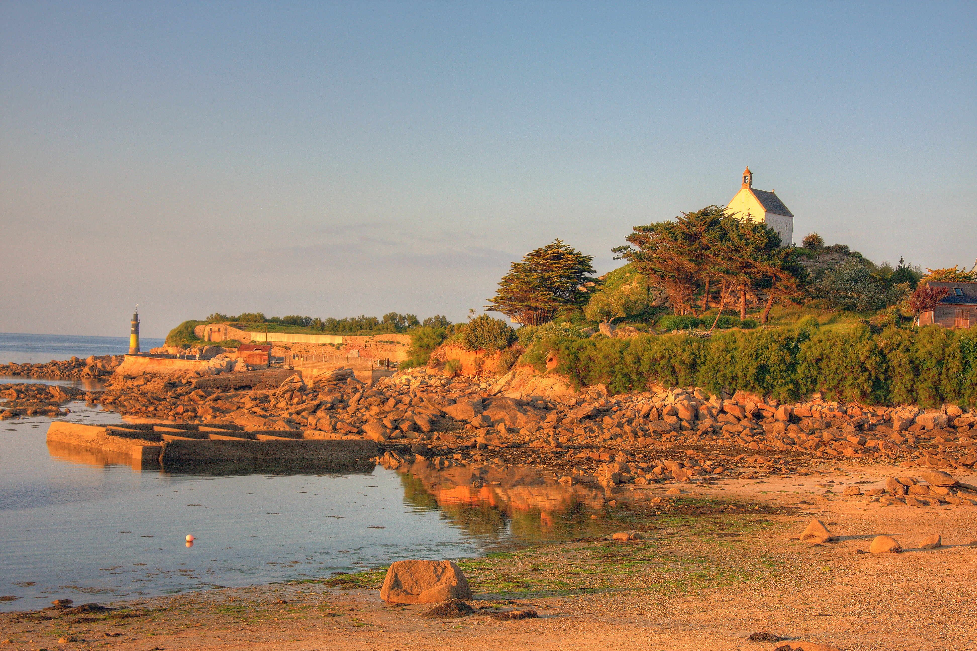 La chapelle Ste Barbe à Roscoff